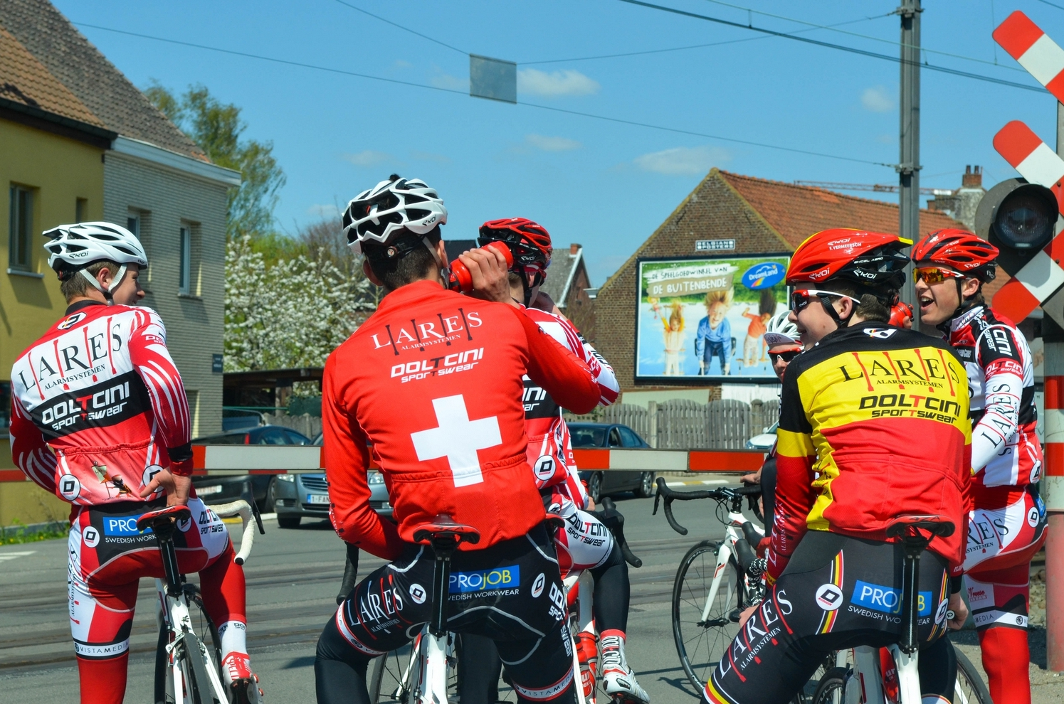 Deze foto werd genomen tijdens de stage in voorbereiding op het seizoen 2015 in de Vlaamse Ardennen.